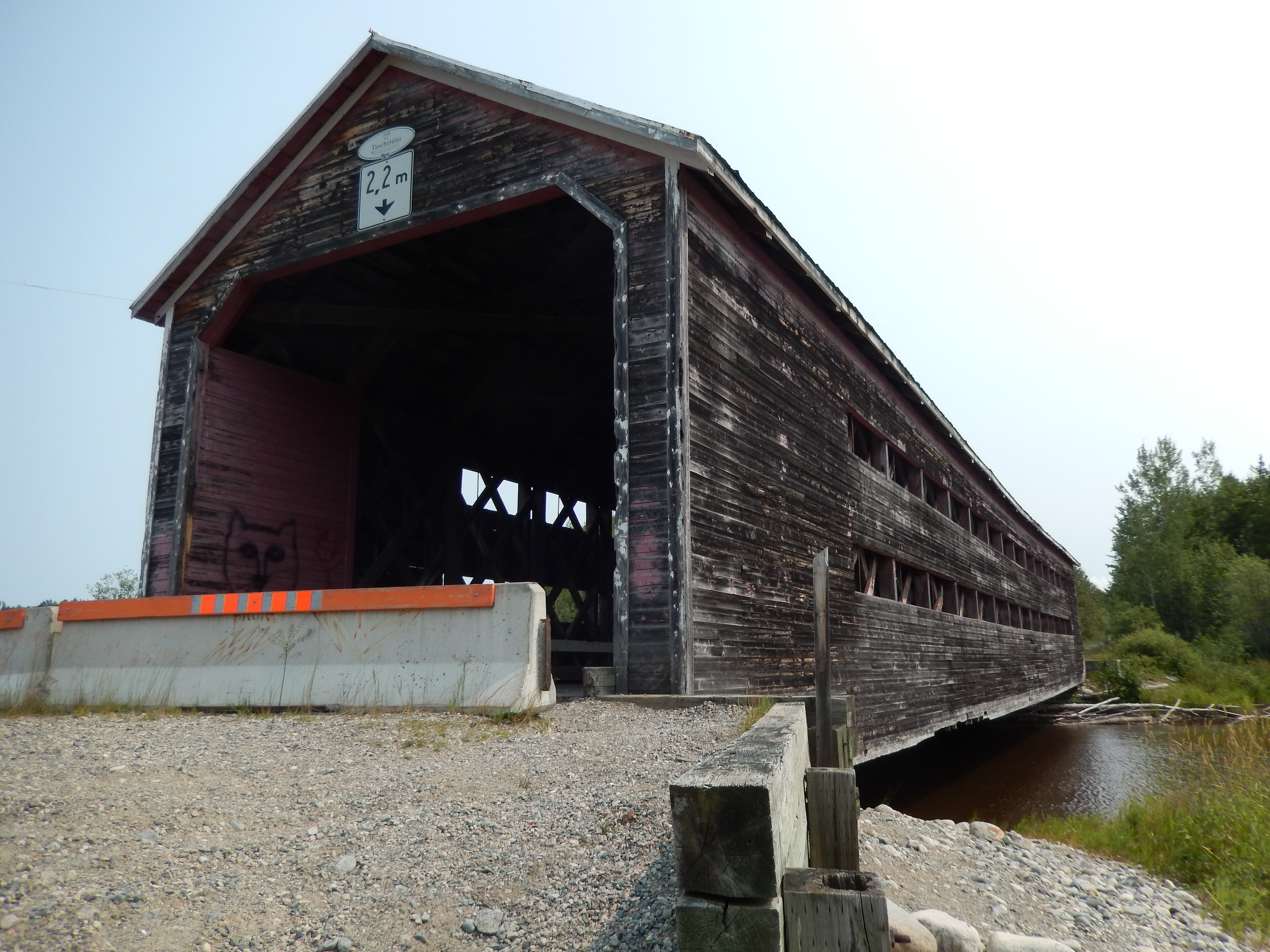 Le pont Taschereau sur la rivière Turgeon